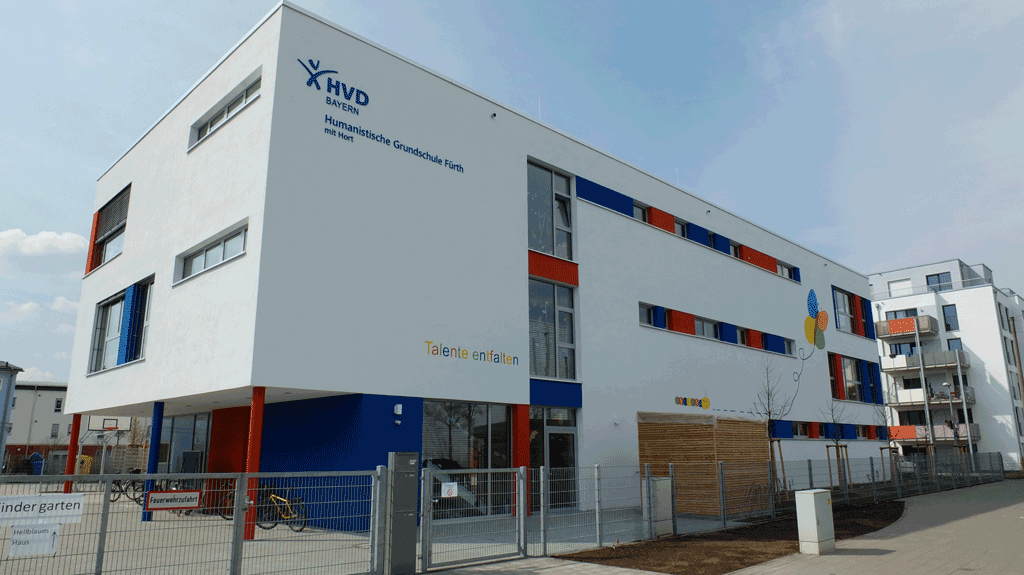 Humanistische Grundschule Fürth